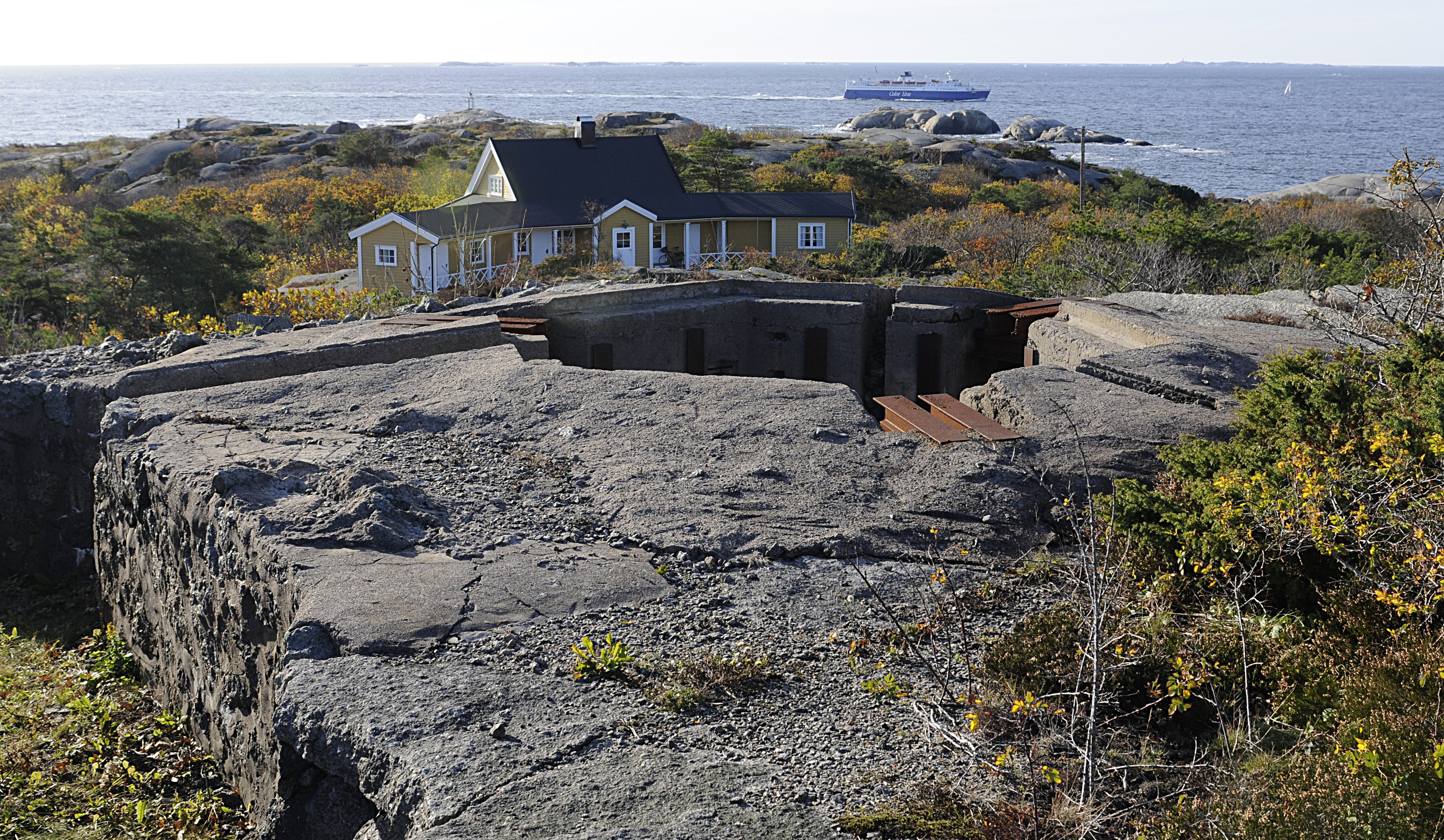 Karakteristisk Heve/Senke flakstilling ved Folehavna fort. I bakgrunnen ser man offisersboligen.